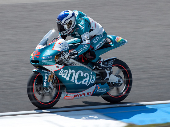 nicolas terol